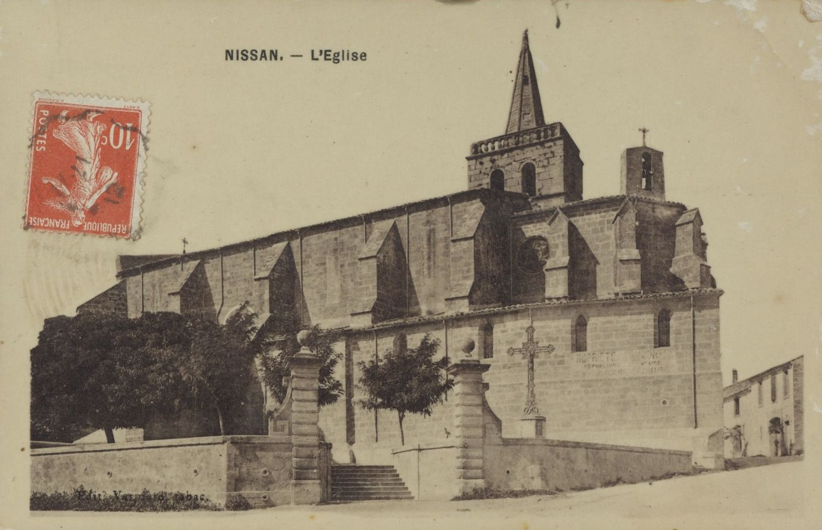 Nissan. - L'Eglise : carte postale.